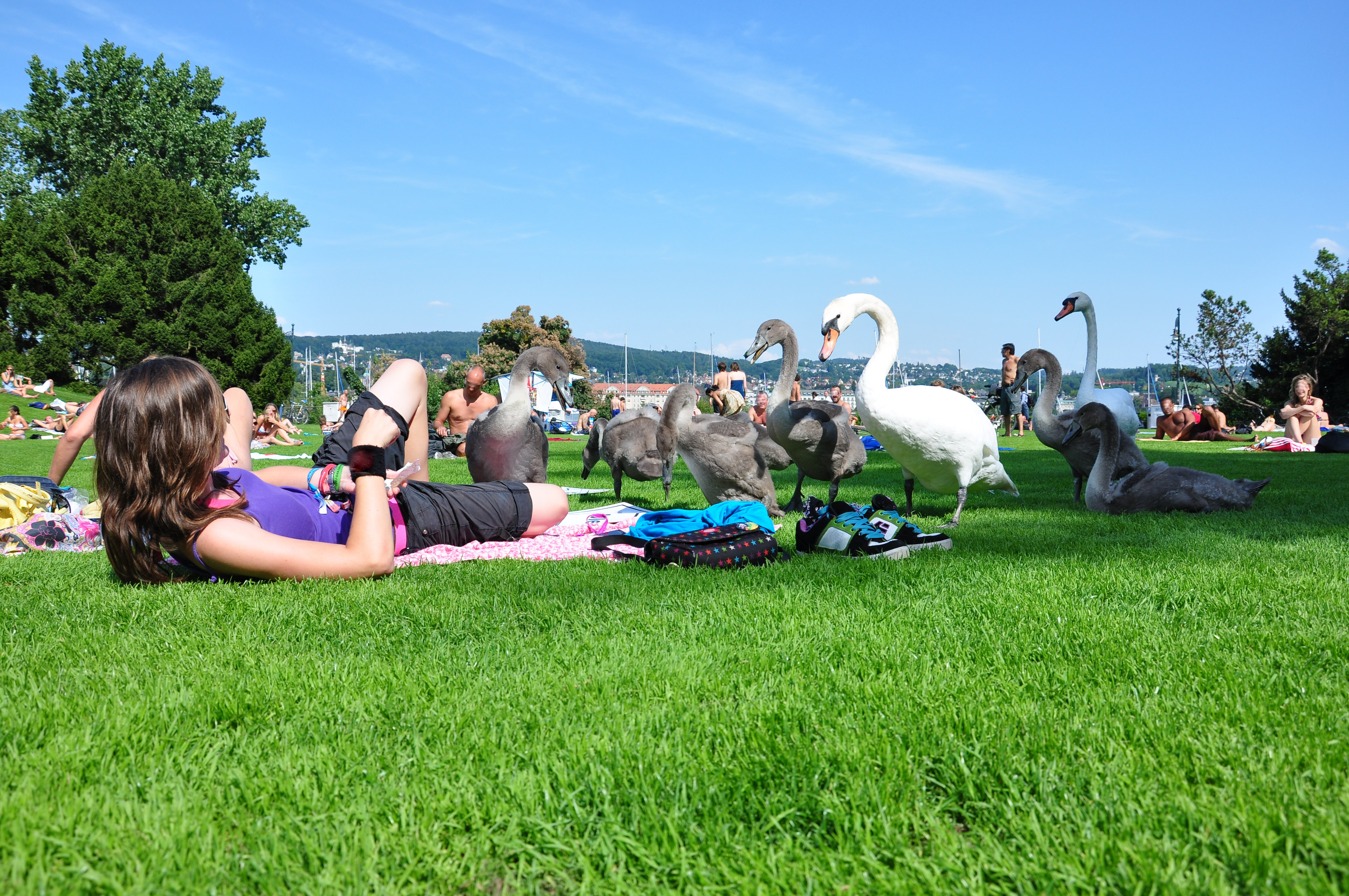 Arboretum in Zürich-Enge (Switzerland)